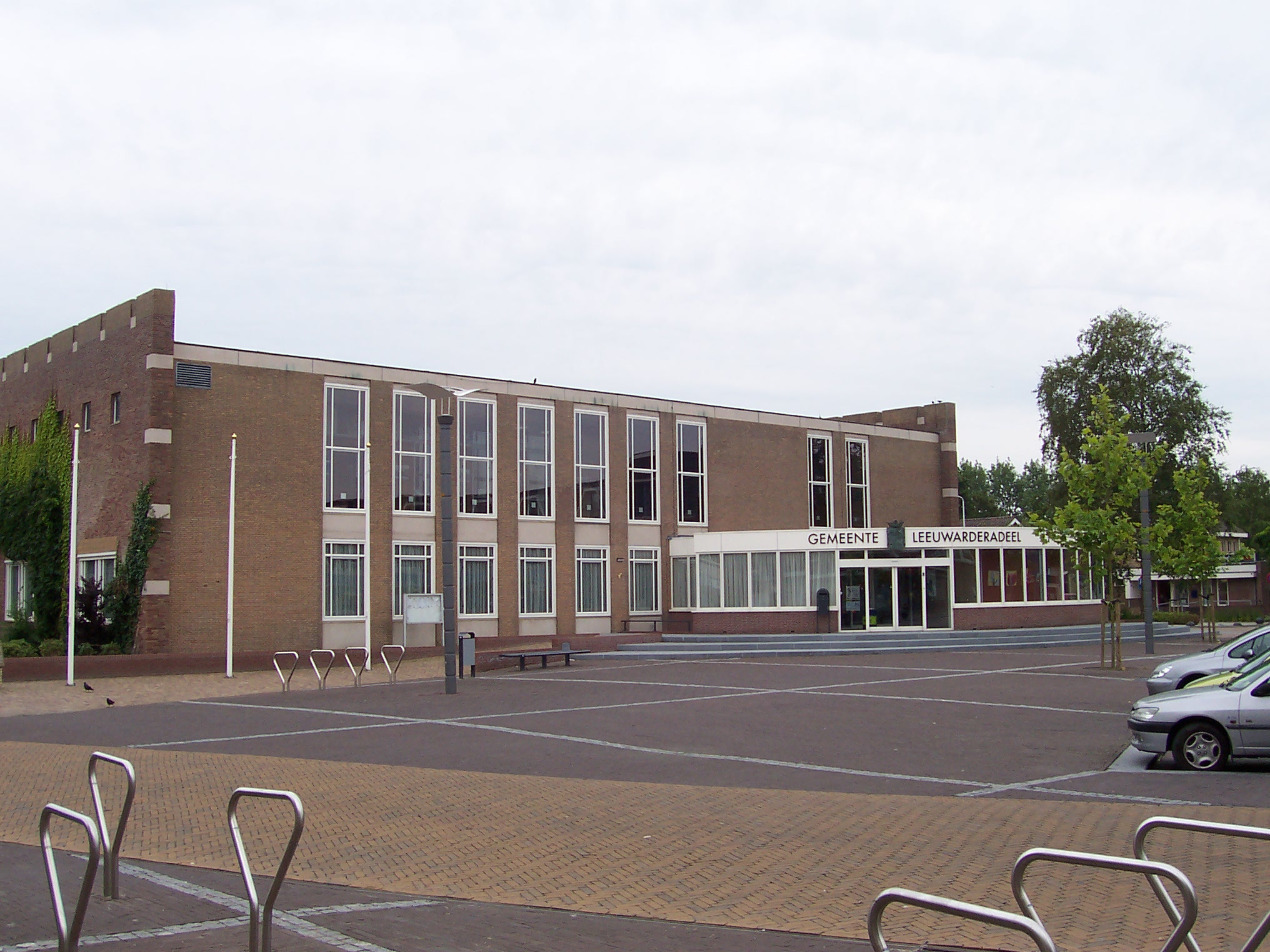 Stiens - Rathaus der Gemeinde Leeuwarderadeel